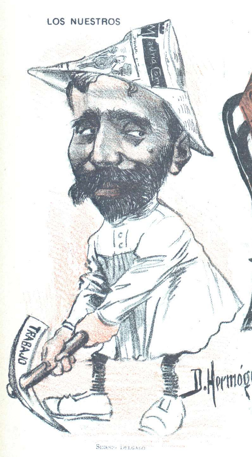 Caricatura.